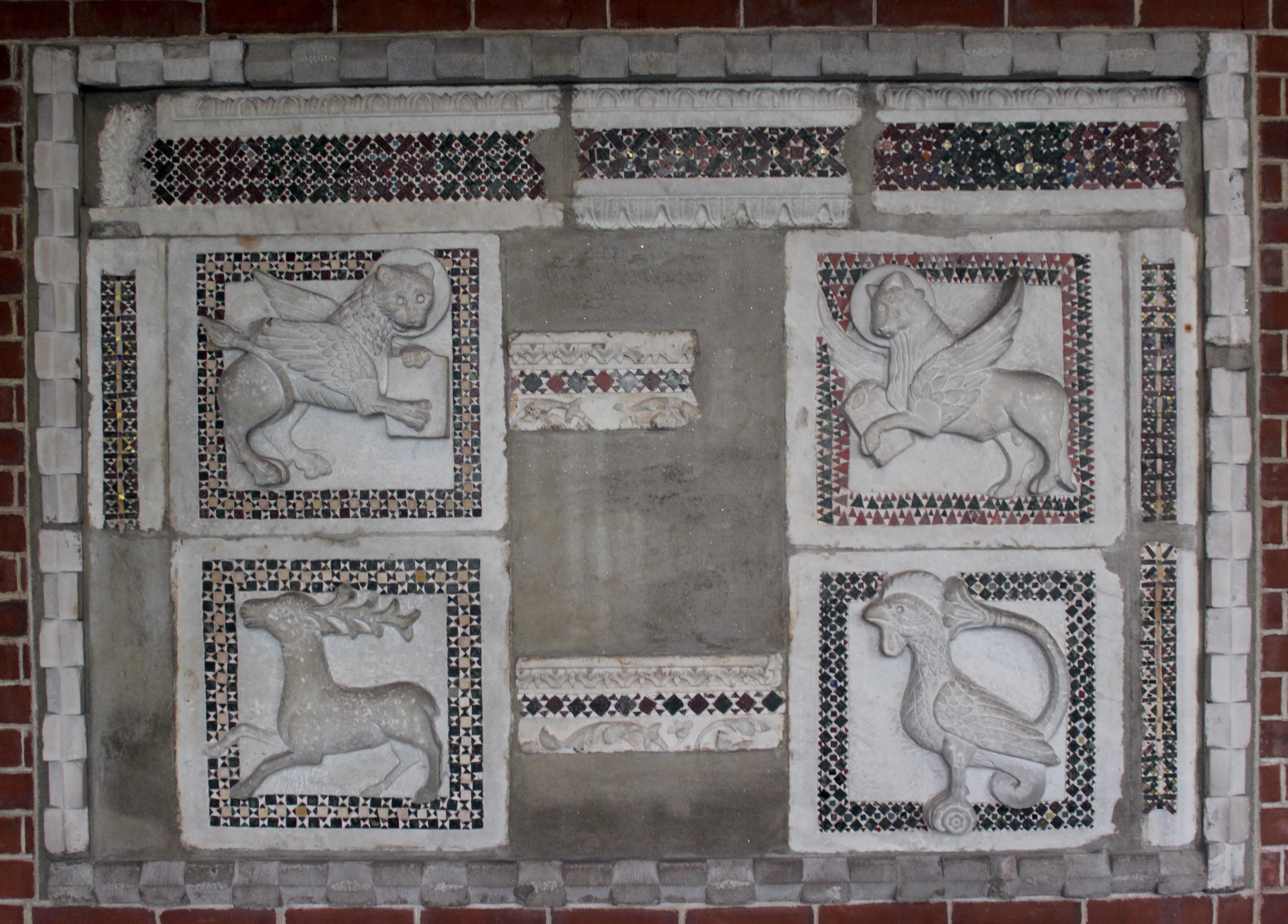 Boston, Isabella Stewart Gardner Museum. Patio.